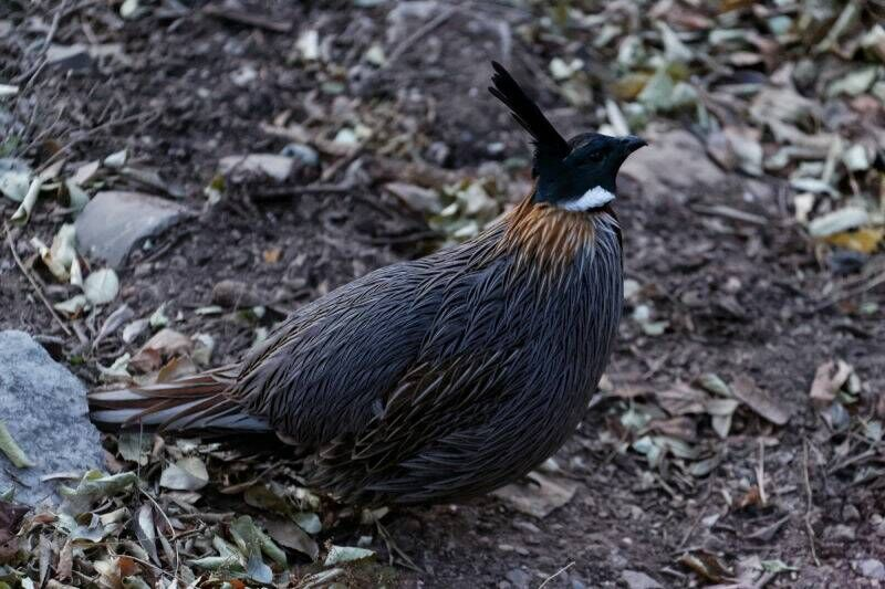 勺鸡（Pucrasia macrolopha），中国国家二级保护动物。（摄于大海陀）